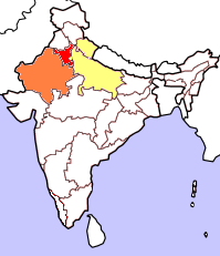 Kartorna bygger på resultat i senaste delstatsval (Juni 2004). Rött betyder att partiet deltar i delstatsregeringen, orange att partiet vann mandat i senaste delstatsvalet och gult att partiet hade lanserat kandidater men utan att vinna mandat. Kartorna tar inte hänsyn till avhopp, partifusioner och fyllnadsval under den ordinarie mandatperiodens gång.